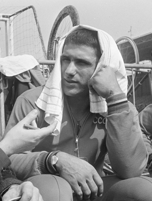 Omar Pkhakadze